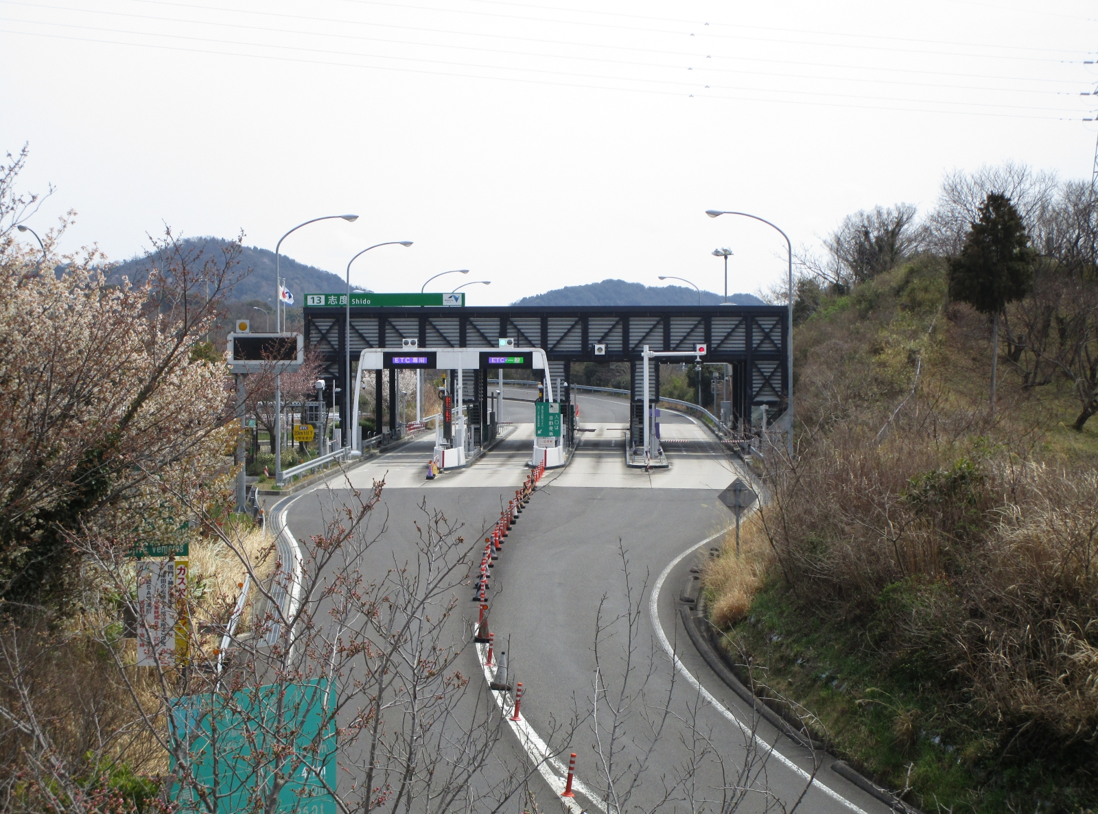 志度インターチェンジ料金所